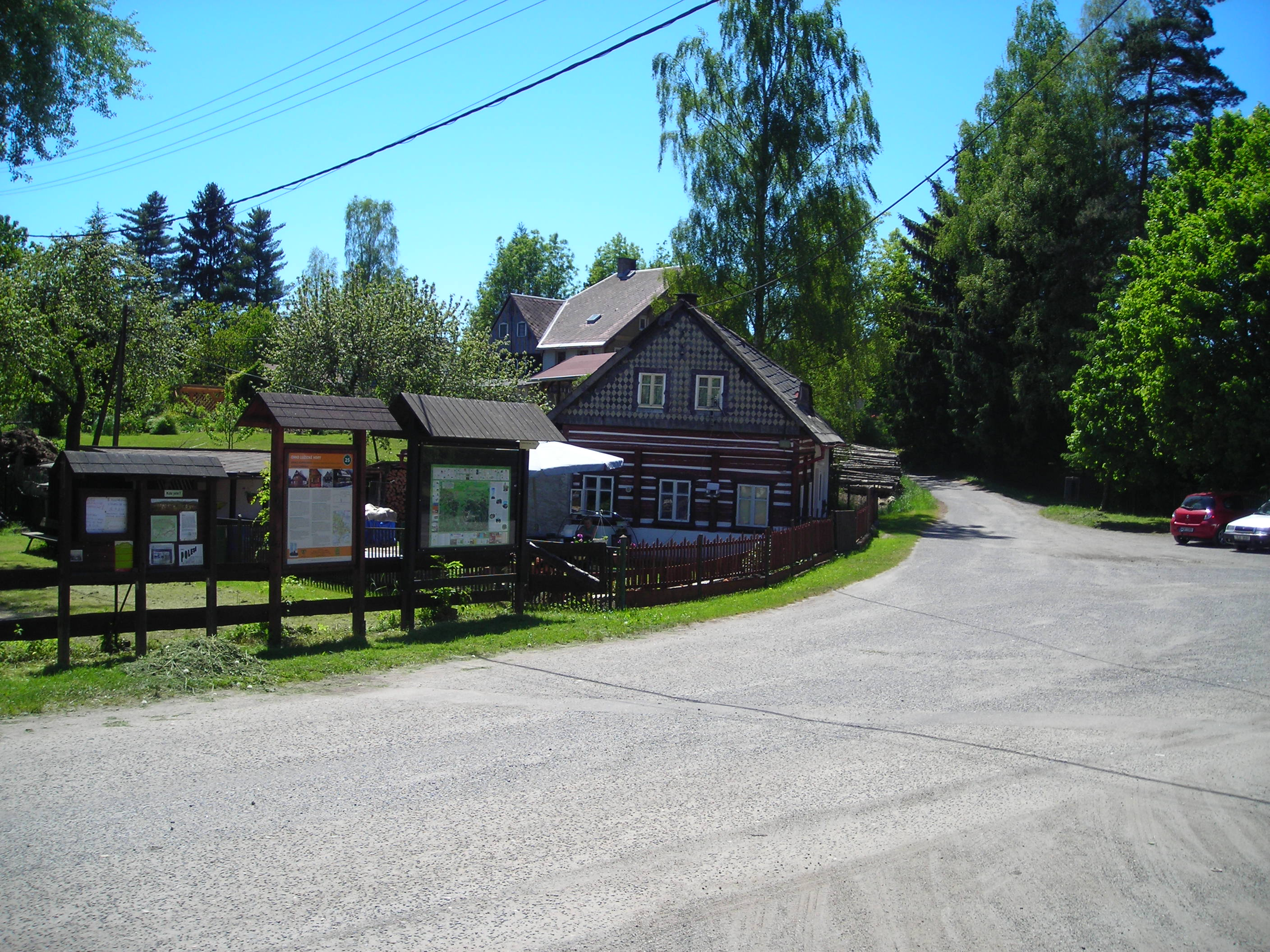 Náves v Polesí, části obce Rynoltice, okres Liberec.